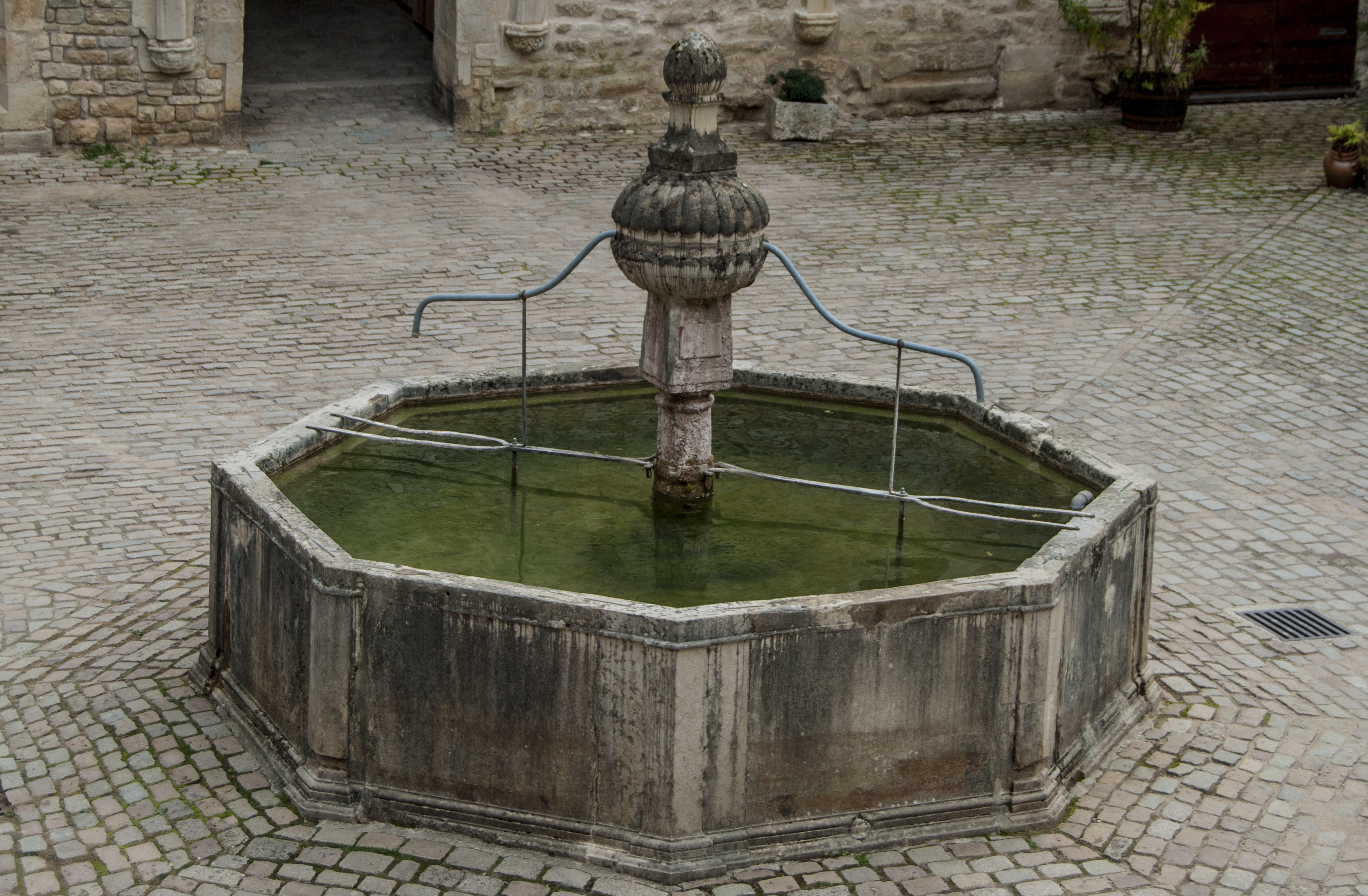 Fontaine de la cour du cloître de l'abbaye Saint-Pierre de Baume-les-Messieurs (Jura),cuve du XVIe siècle et colonne du XVIIe siècle.